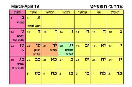 דף מלוח שנה עברי אדר תשעט (כולל גם תאריכים לועזיים)